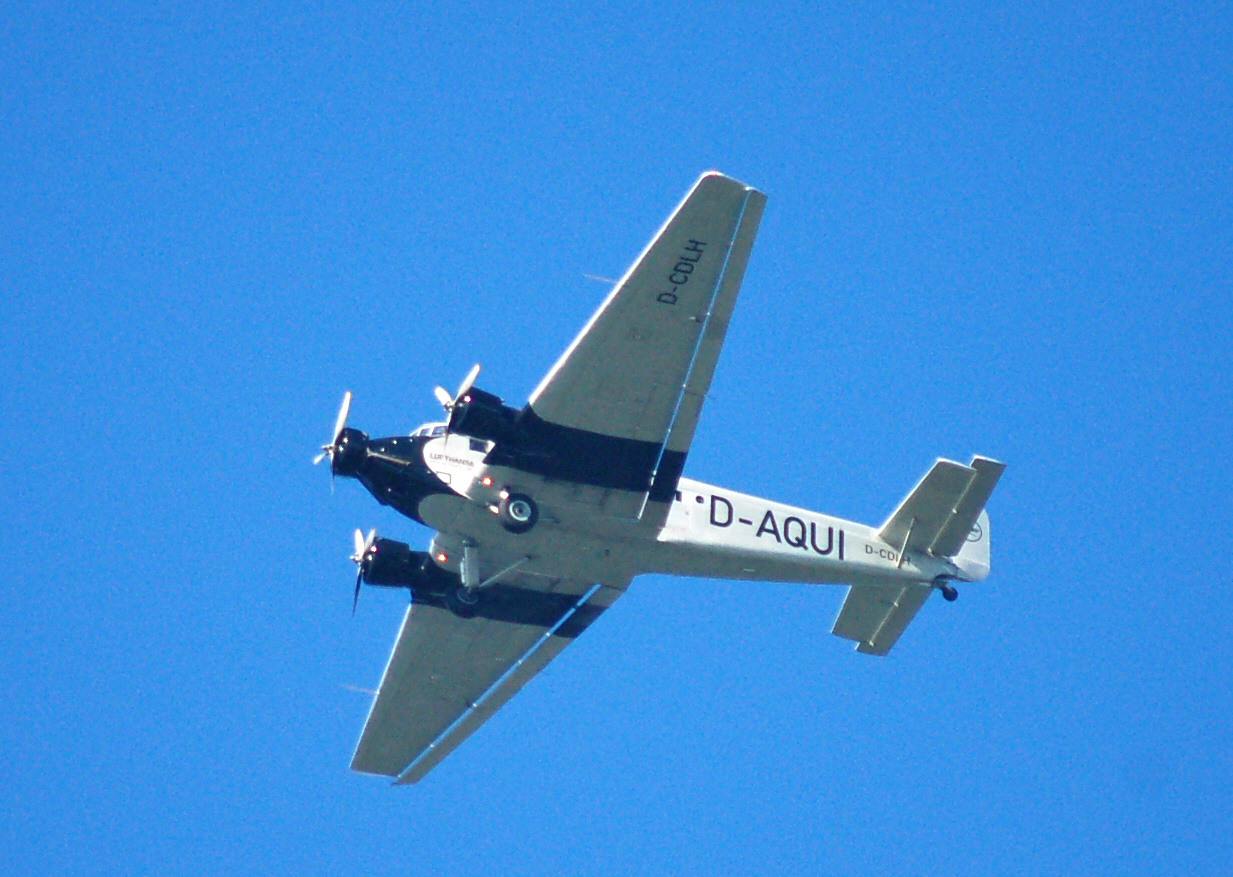 Junkers Ju52 (D-AQUI) über dem Flugplatz Uetersen